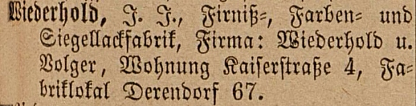 Wiederhold, J. J., Firniß-, Farben- und Siegellackfabrik, Firma: Wiederhold u. Volger, Wohnung Kaiserstraße 4, Fabriklokal Derendorf 67 - Eintrag im Adreßbuch der Oberbürgermeisterei Düsseldorf, zusammengestellt am 1. August 1868, Teil I, S. 169.